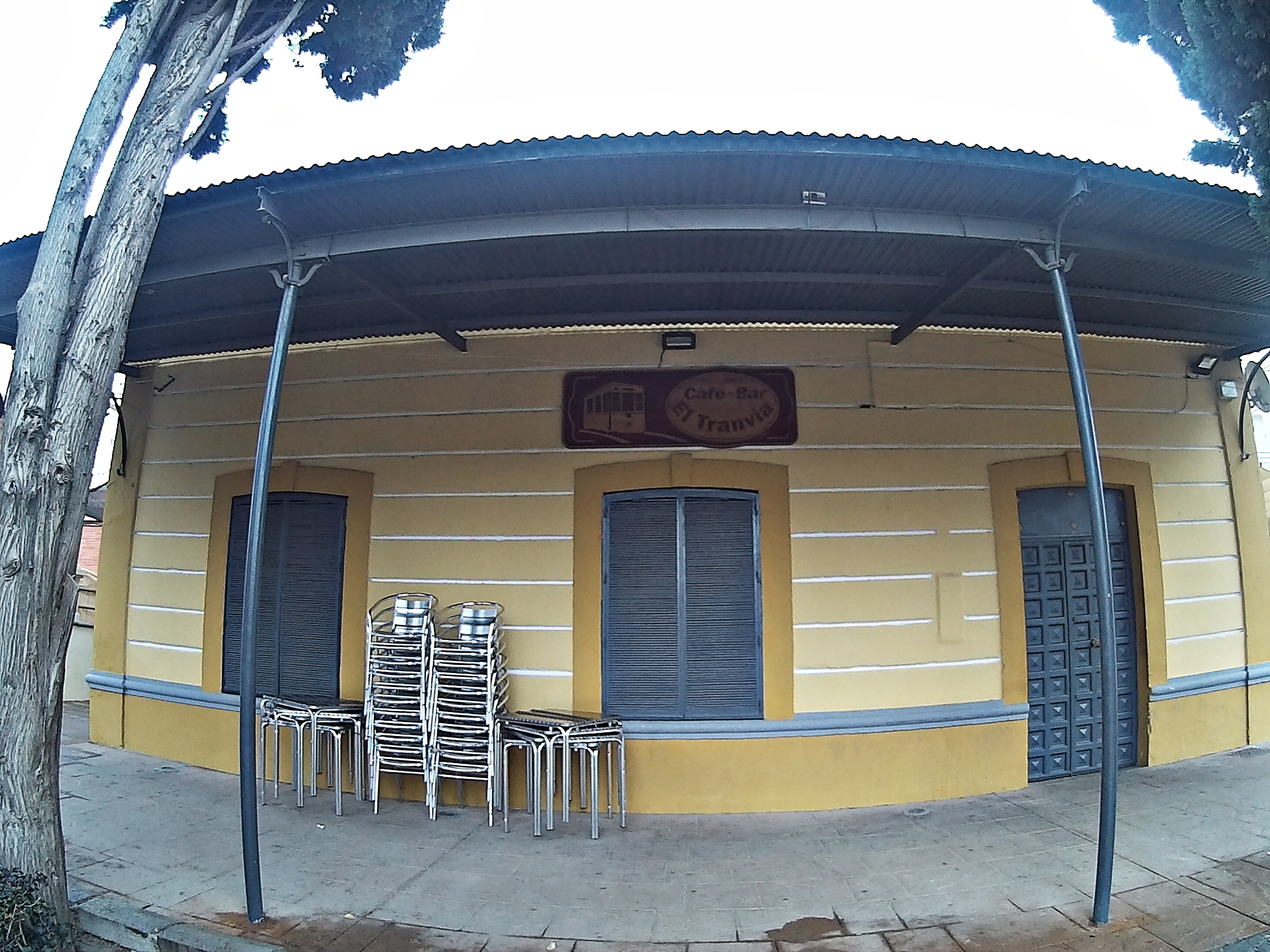 Estación ahora convertida en café, en el parque de Alhendín.